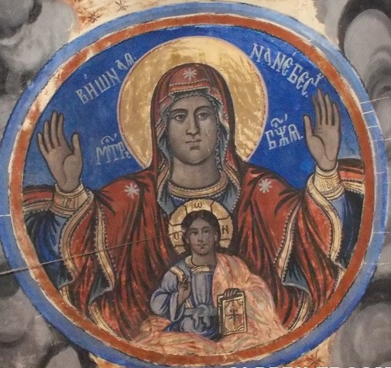 ЦРКВА „СВЕТИ ТЕОДОР ТИРОН“, СЕЛО ДРЕНОВЦИ, Прилепско